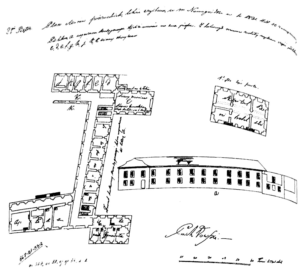 Беларуская (тарашкевіца): Наваградак (Navahradak), вуліца Траецкая (vulica Trajeckaja). Калегіюм езуітаў